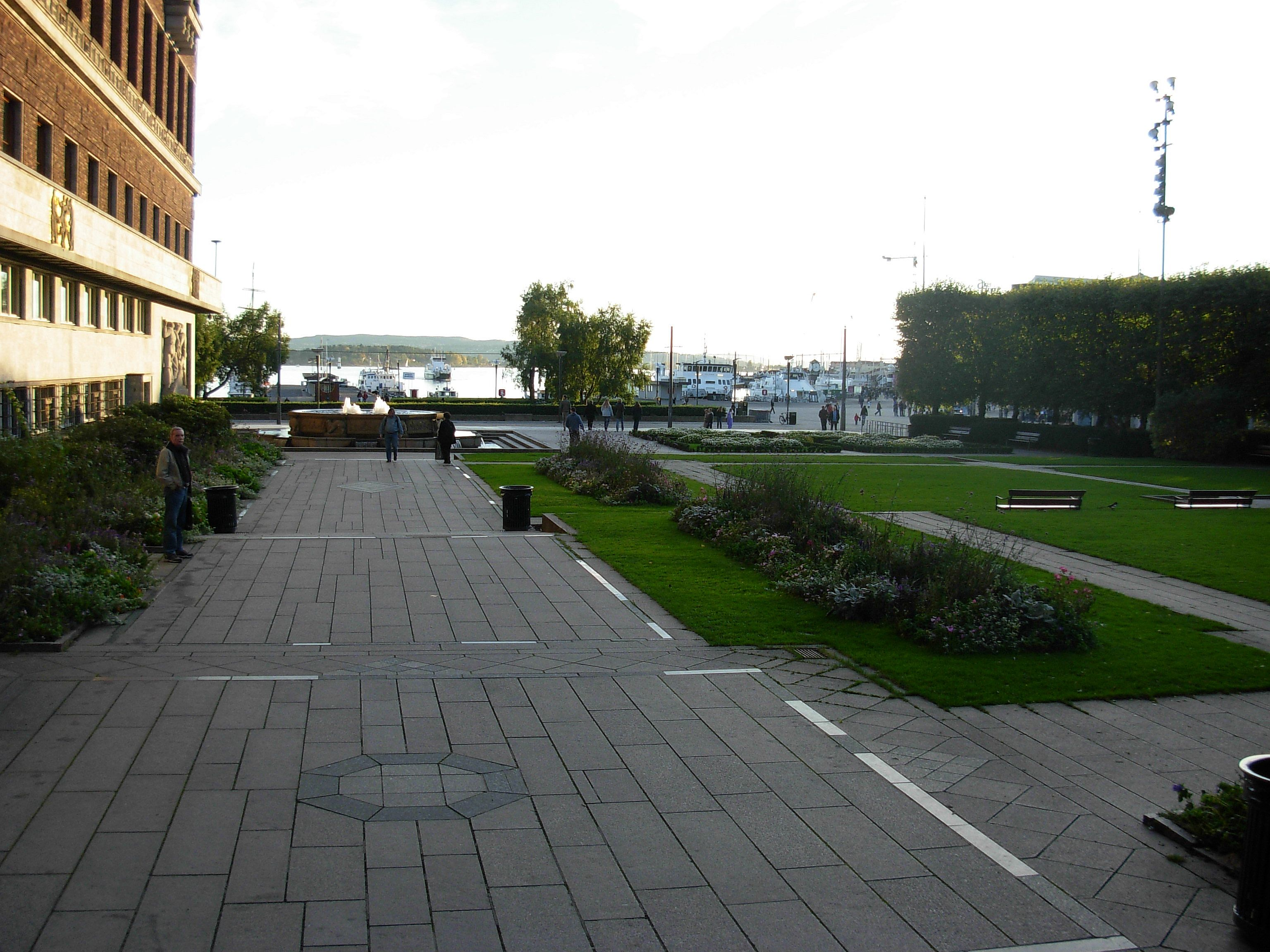 Kronprinsesse Märthas plass (Rådhushagen), Oslo